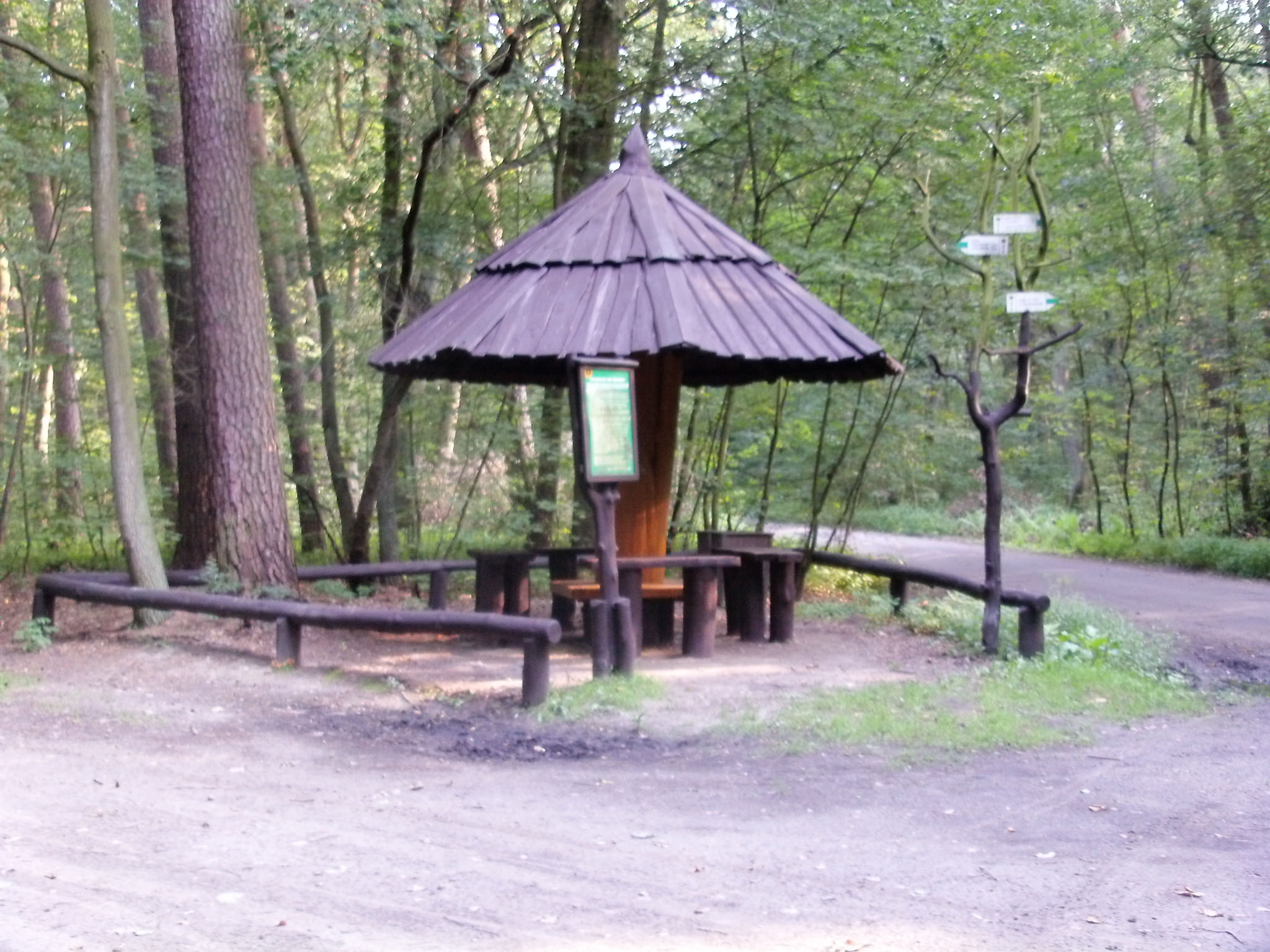 daszek w Wielkopolskim Parku Narodowym